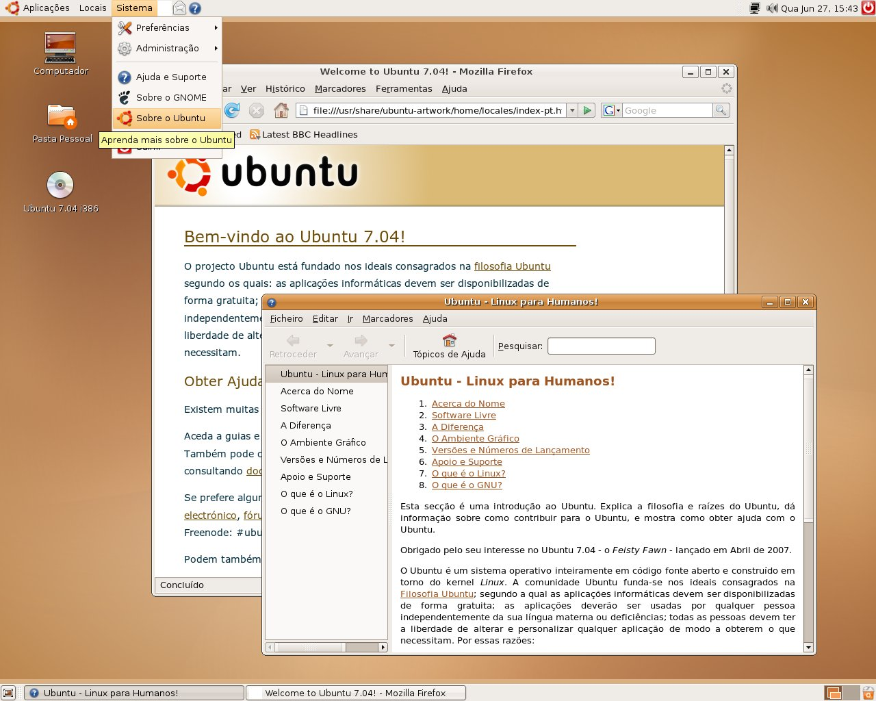 Ambiente de trabalho do Ubuntu 7.04 Desktop (em língua portuguesa; sem logo do Firefox); por um aluno de 13 anos do ensino básico (sob supervisão) / Ubuntu 7.04 Desktop workspace (in Portuguese language, without Firefox logo); by a 13 years old student of an elementary-secondary school (under supervision).